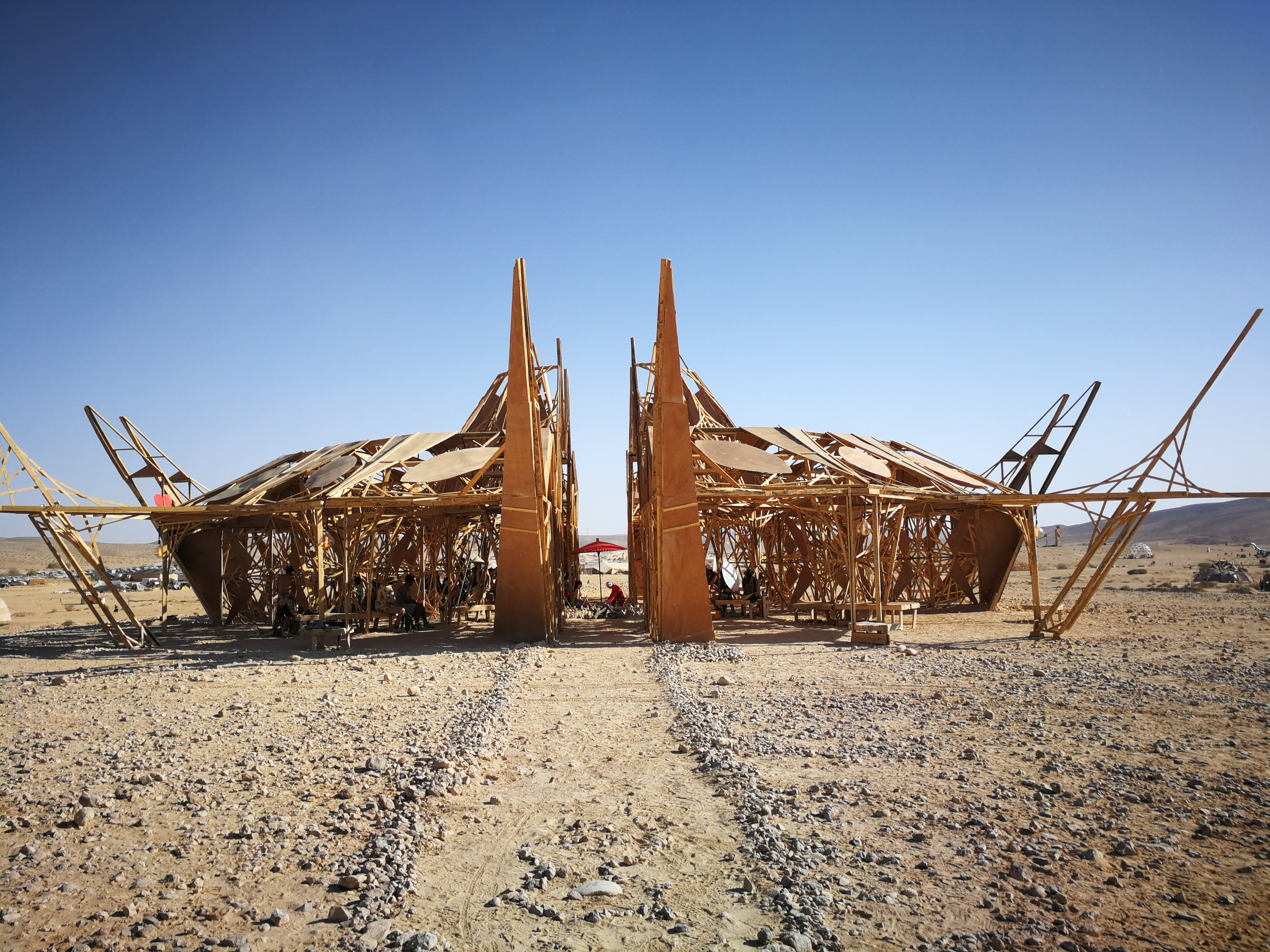 בשנת 2018 הוחלף הטמפל ב"מצפן" כך שיציג את הכיוון בתוך הכאוס (תמת מידברן 2018) במקום הטמפל שמסמל זכרון